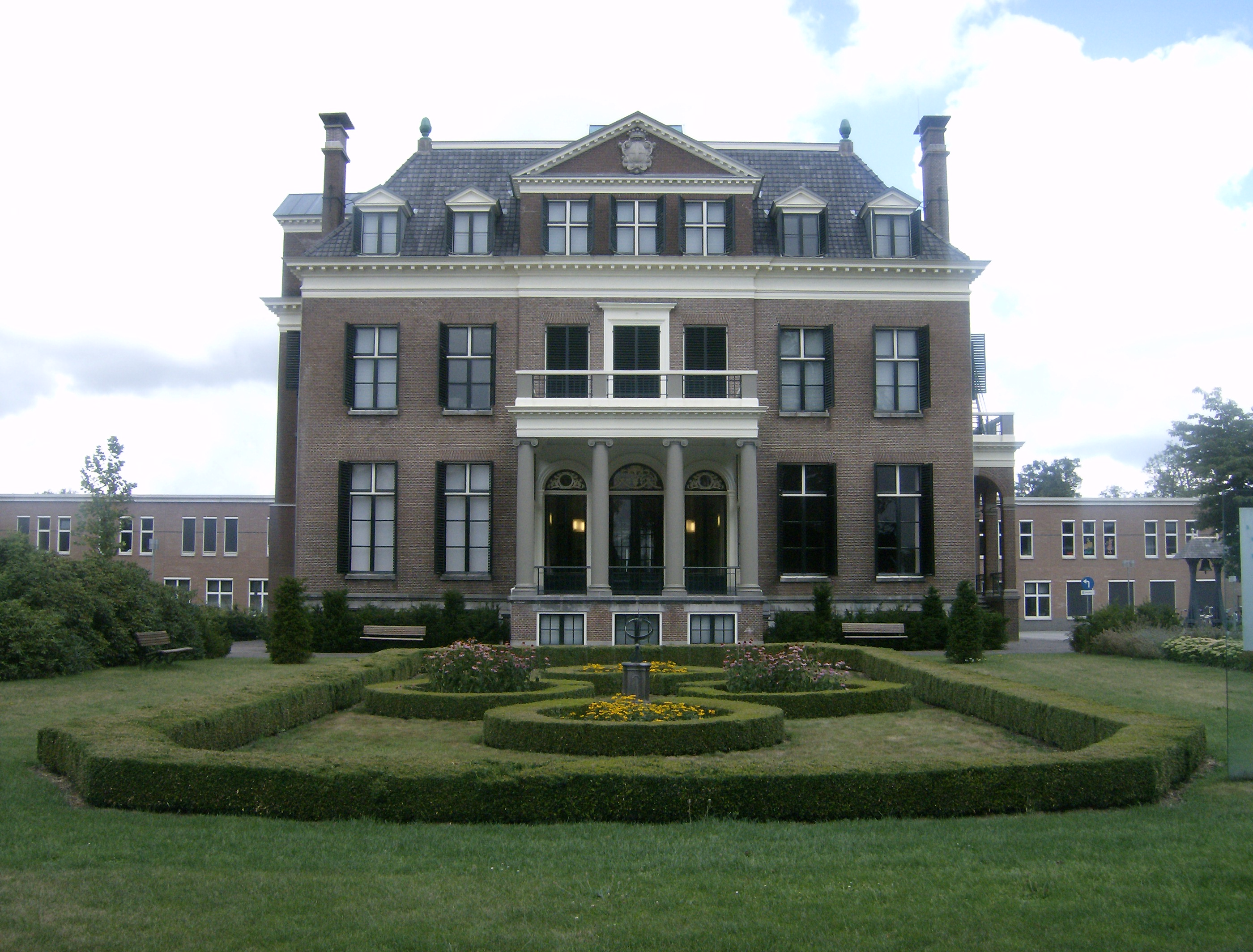 Lyndensteyn te Beetsterzwaag